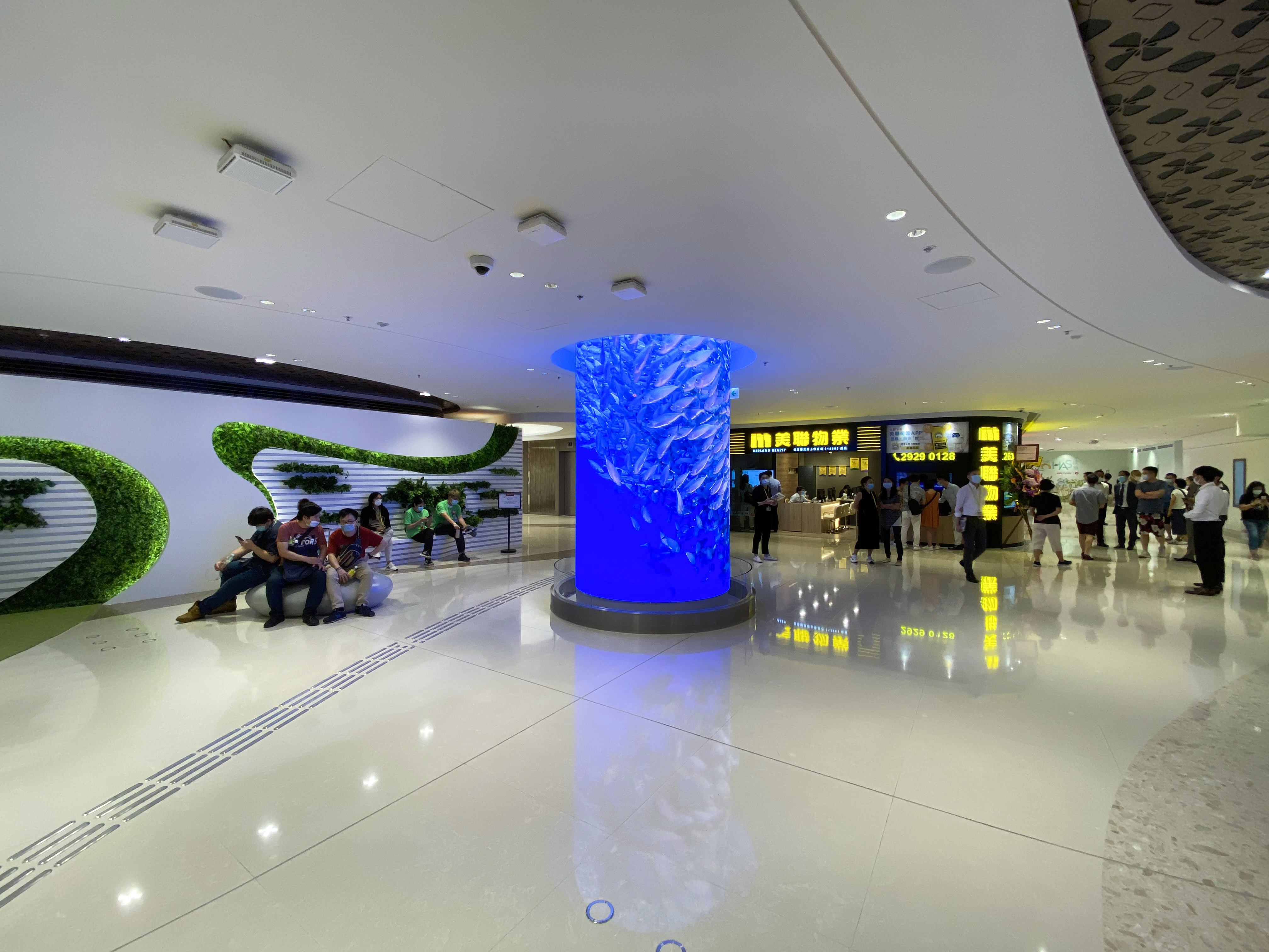 THE LOHAS Level 3